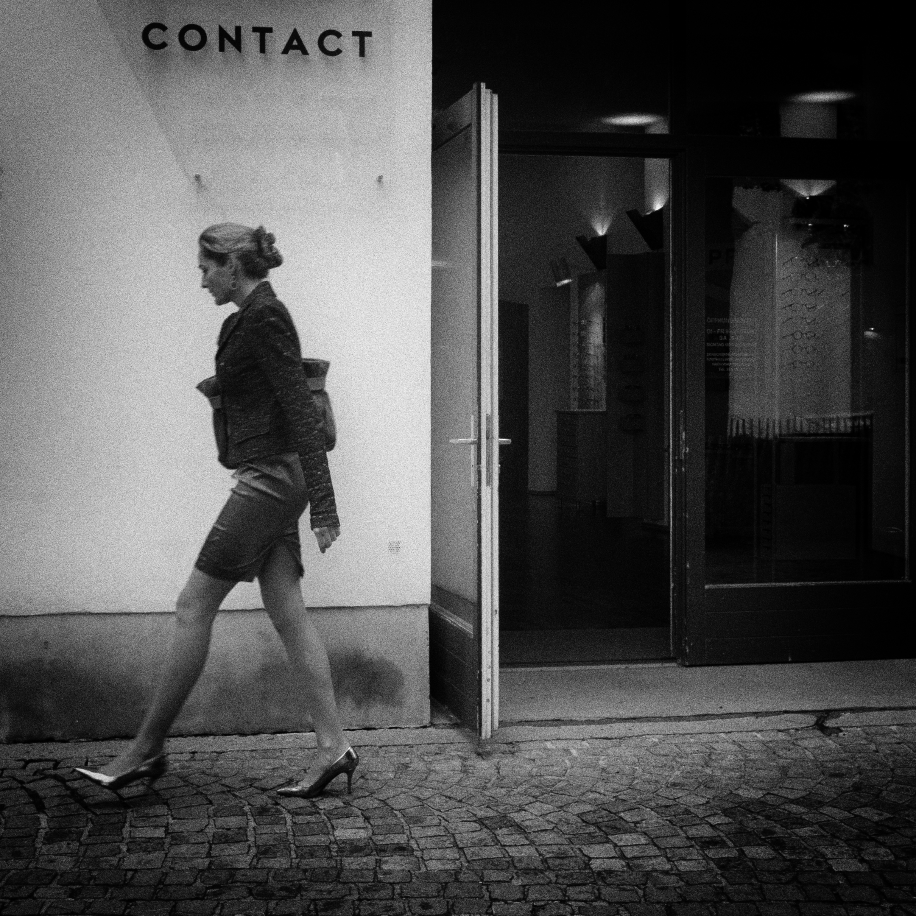 contact